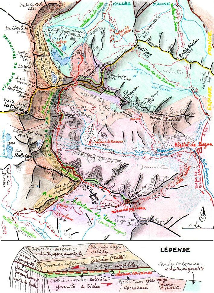 Carte topograhique et géologique de la région du Cirque de Gavarnie